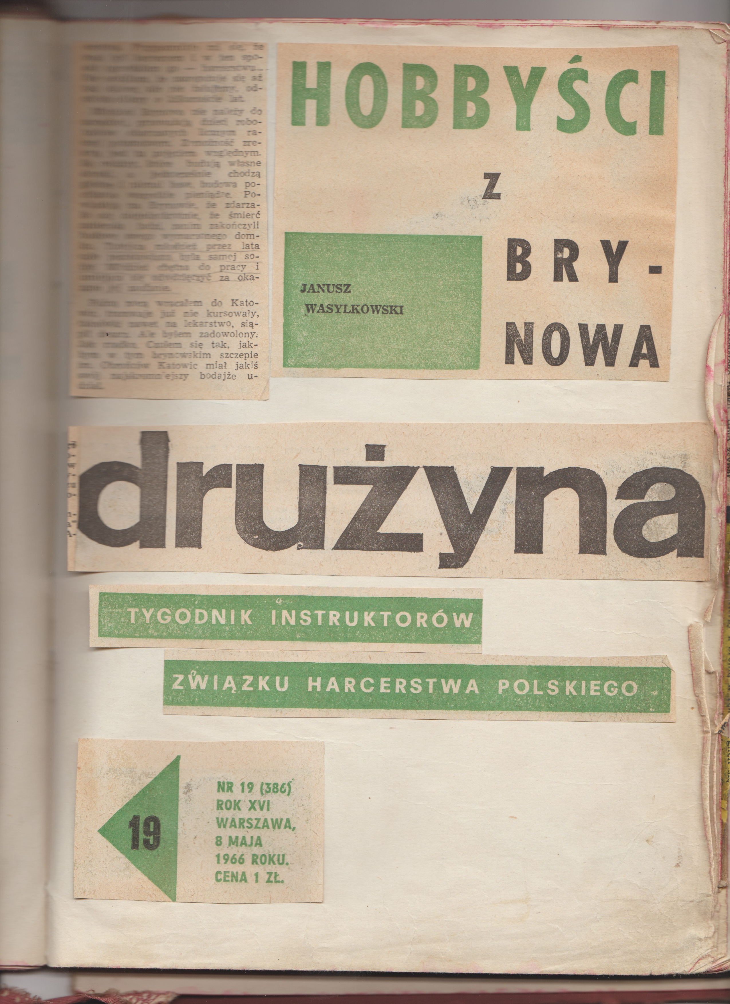 Skan z kroniki muzeum.